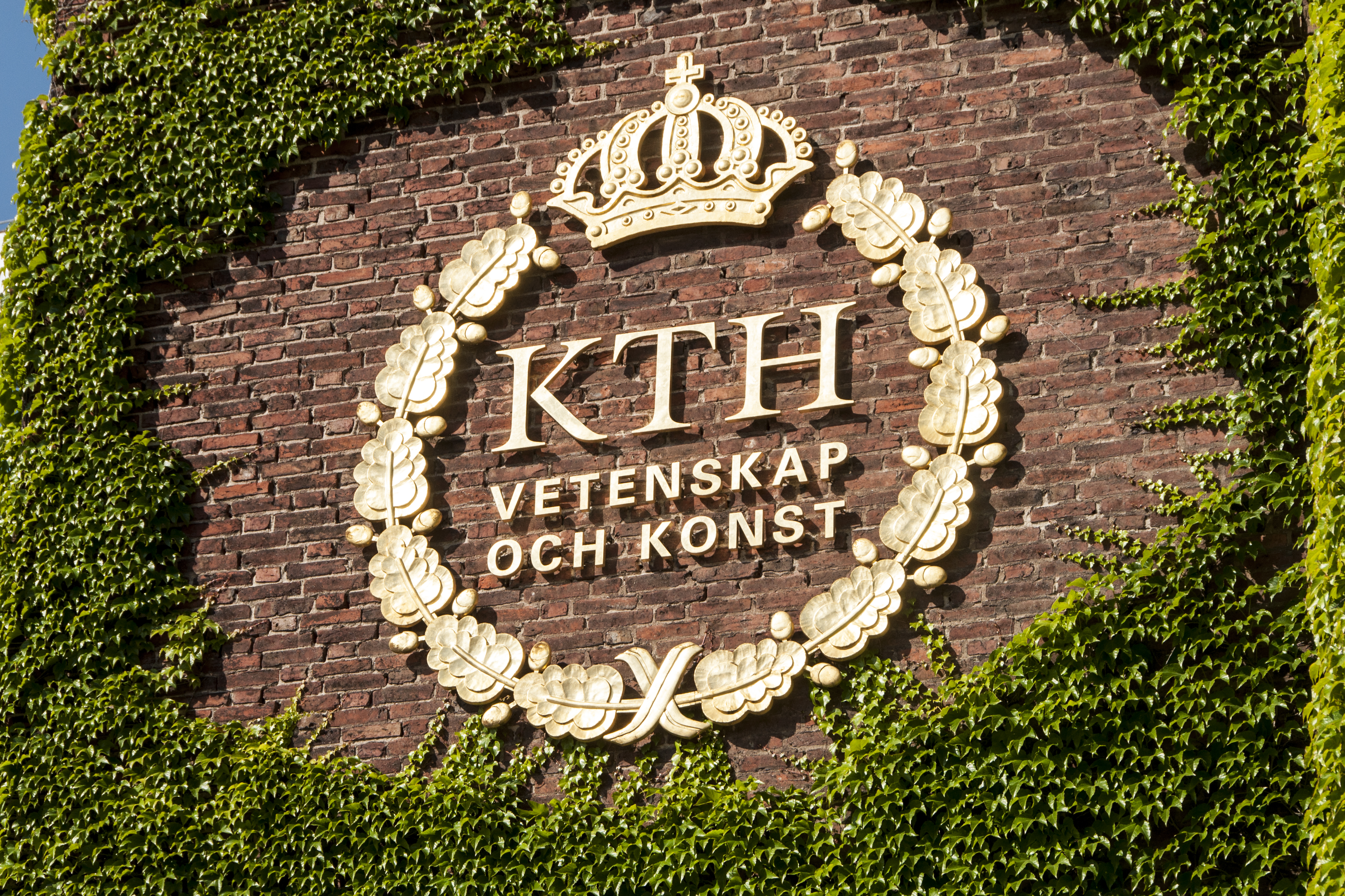 KTH logotype